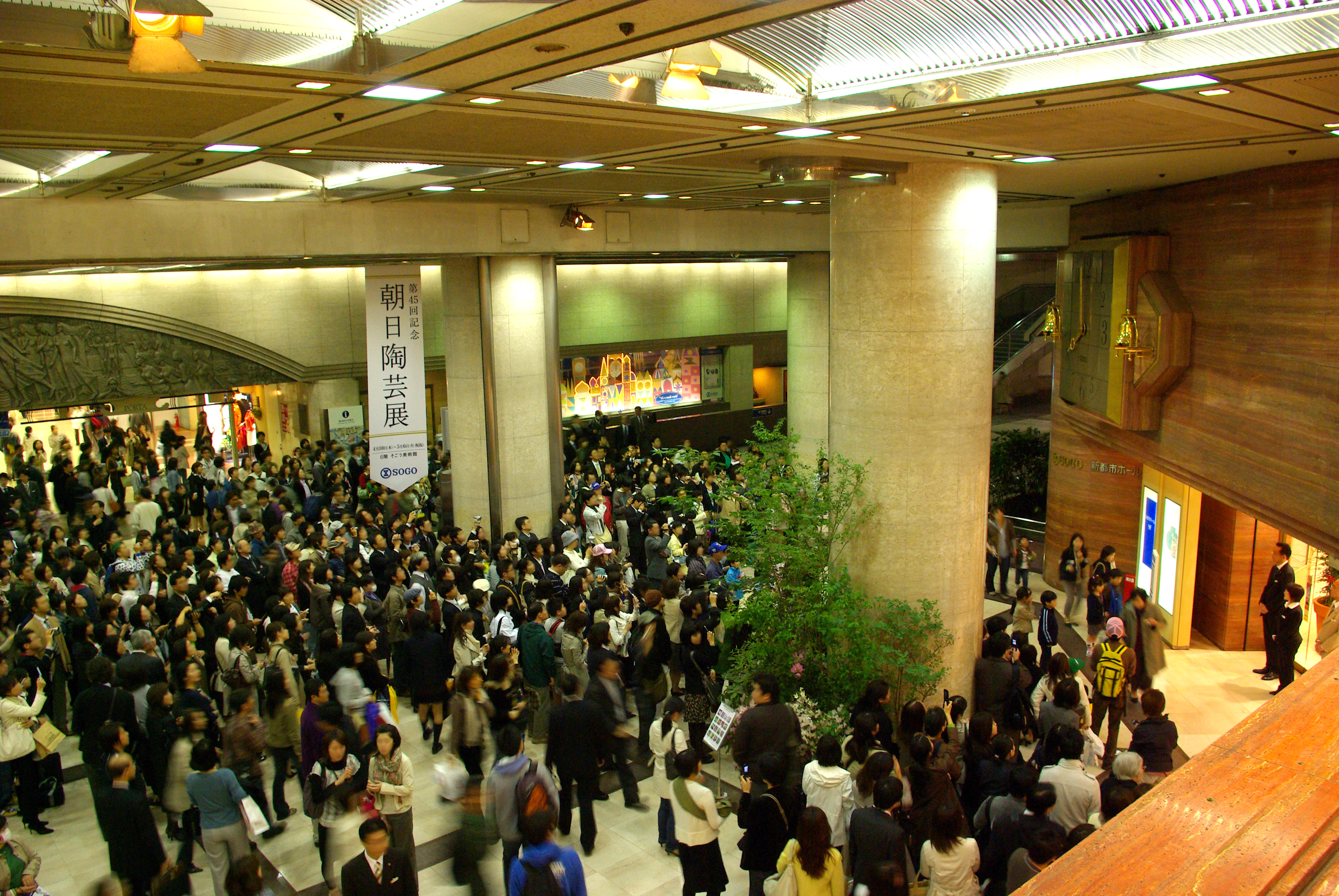 横浜そごう 世界の人形時計(からくり時計)の停止を惜しみ集まった人々。